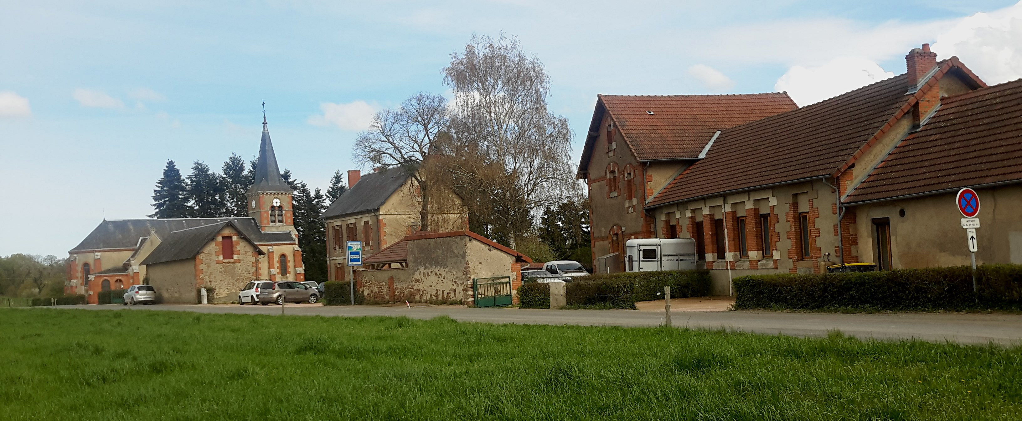 Vue générale de Saint-Christophe (Allier), France.